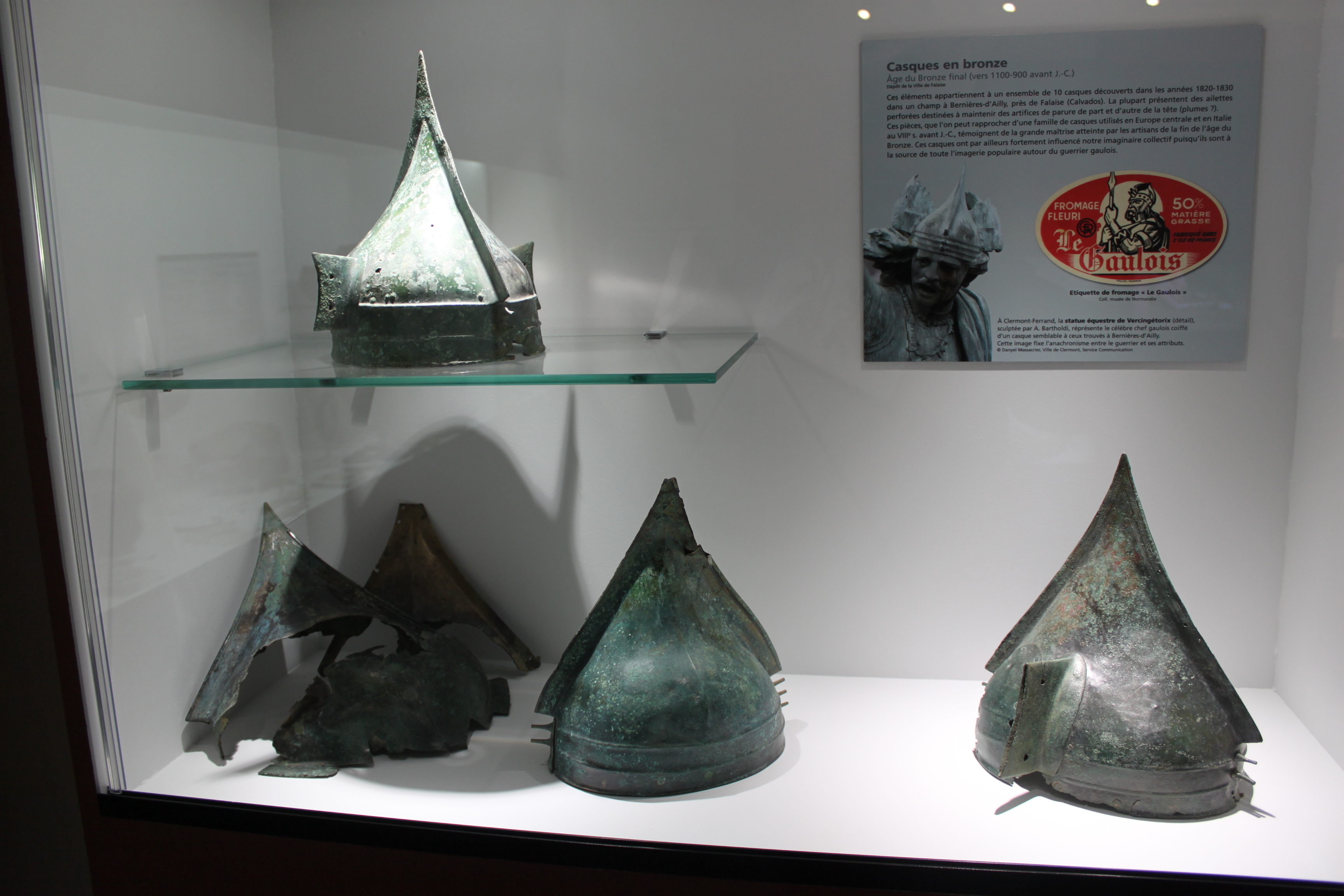 Caen, France